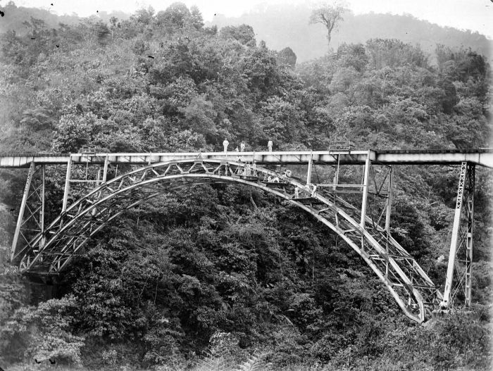 Negatief. Ook op Sumatra verschenen de spoorwegen. Echter, net als het wegennet kwam het spoor later dan op Java en ontstond er geen geïntegreerd net, terwijl de totale lengte van het net bij lange na het niveau van Java niet bereikte. Omdat Sumatra ook veel minder dicht bevolkt was dan Java, scoorde Sumatra wat betreft het aantal kilometers spoorlijn per aantal inwoners echter toch nog hoger dan Java. Er waren drie spoornetten, namelijk in het noorden (Atjeh, Sumatra's Oostkust), het midden (Sumatra's Westkust) en het zuiden (Lampong, Palembang). De lijn op de foto, vanuit Padang, was vooral aangelegd voor het transport van kolen van de Ombilinmijnen. (P. Boomgaard, 2001). Mannen werken aan de Duivelsbrug in de Anaikloof, dichtbij Air Mantjoer, Sumatra's Westkust